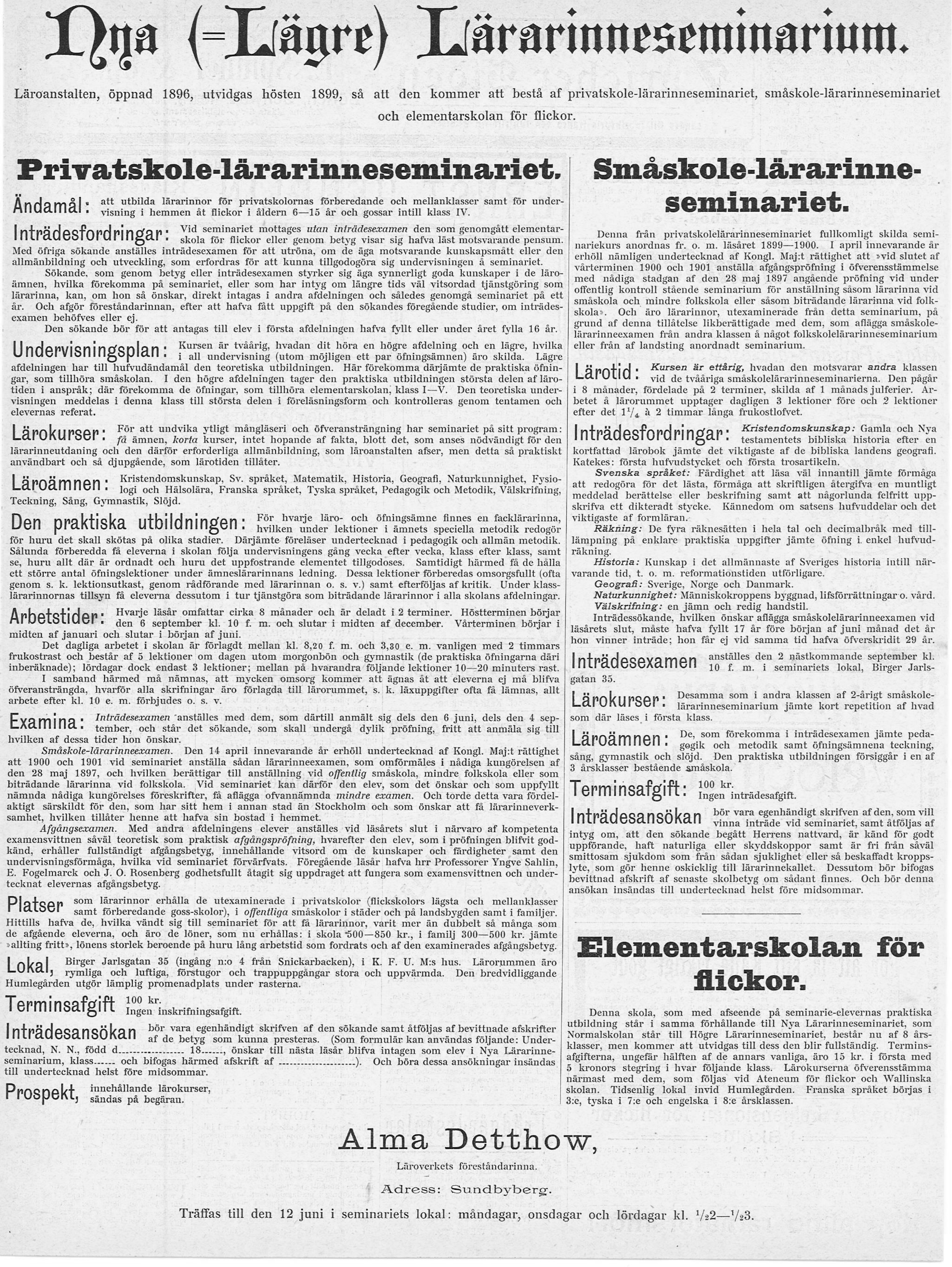 Annons för Nya (=Lägre) Lärarinnesemunarium